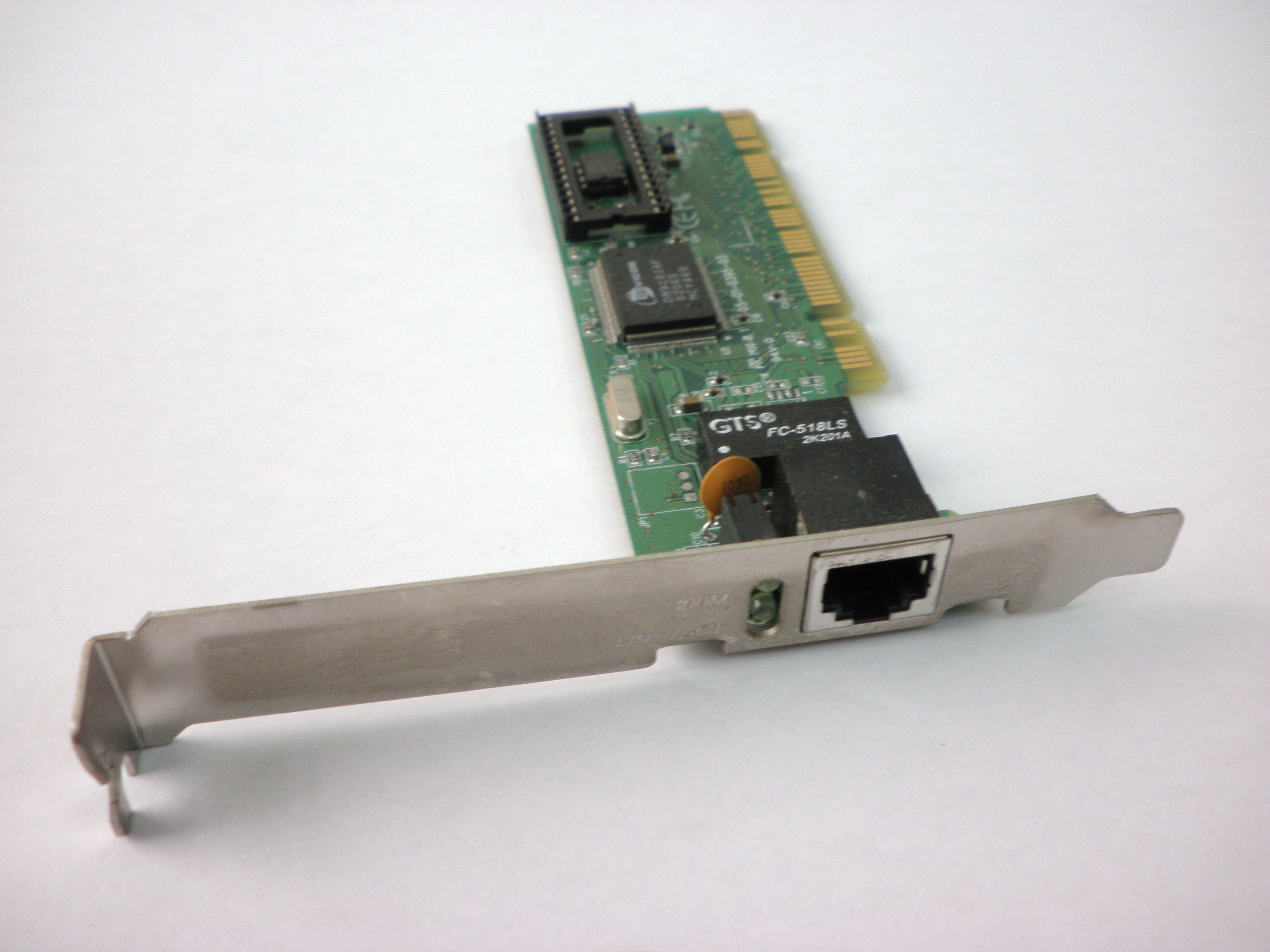 Tarjeta Ethernet